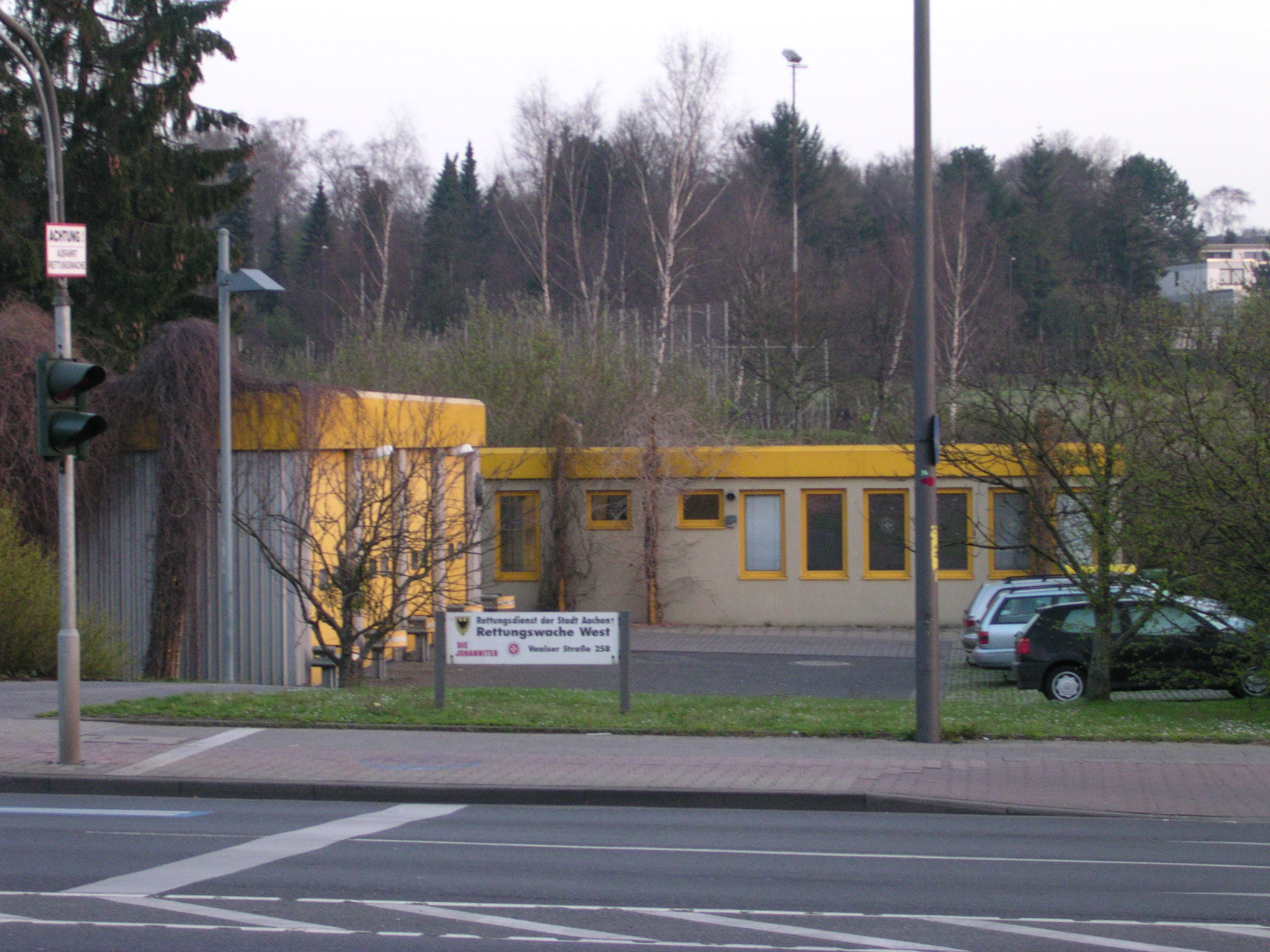 Aachen, Rettungswache West